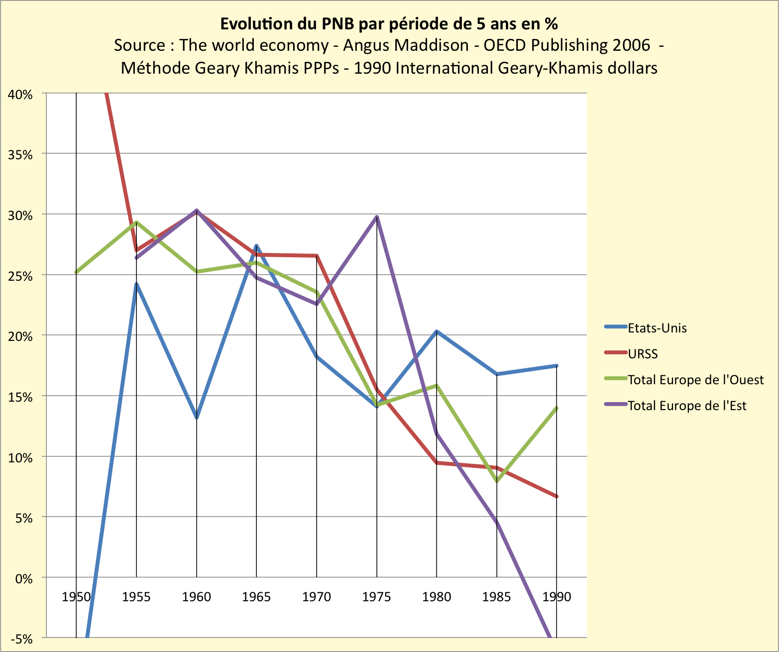 Graphique montrant l'évolution du PNB en % par période de 5 ans entre 1950 et 1990 pour les Etats-Unis, l'URSS, l'Europe de l'Ouest et l'Europe de l'Est